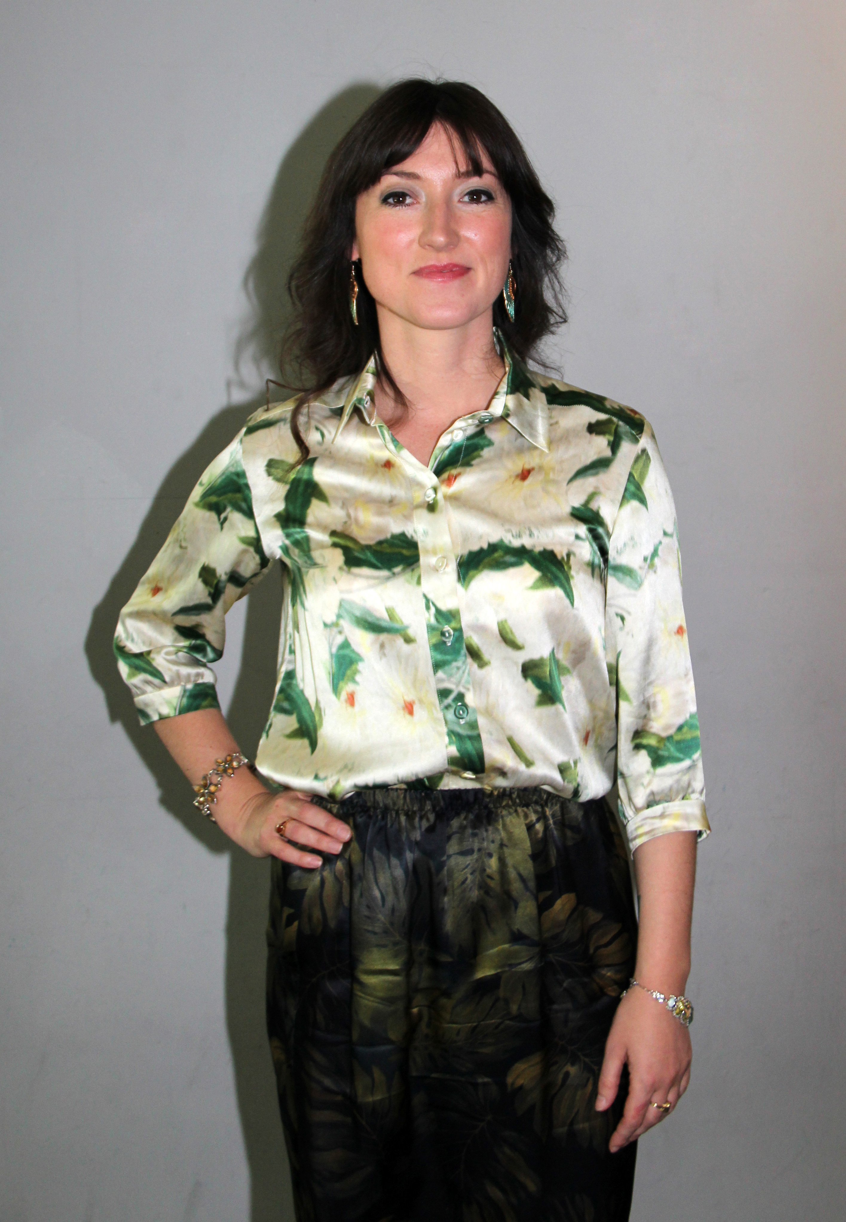 Charlotte Roche auf der Frankfurter Buchmesse 2011